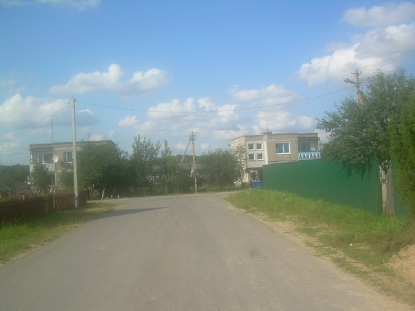 Поселок Поплавцы